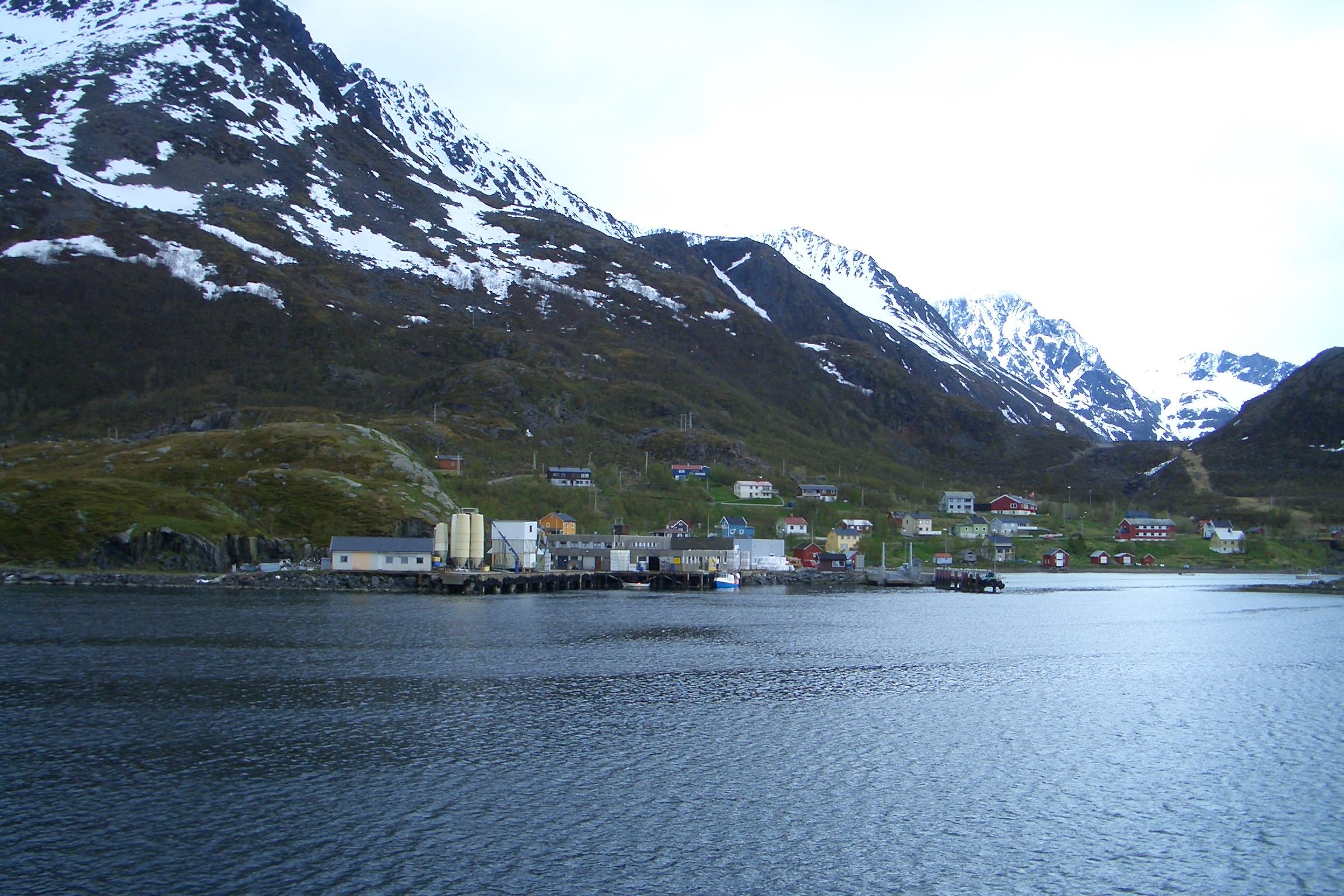 Bergsfjord in Loppa, Norway